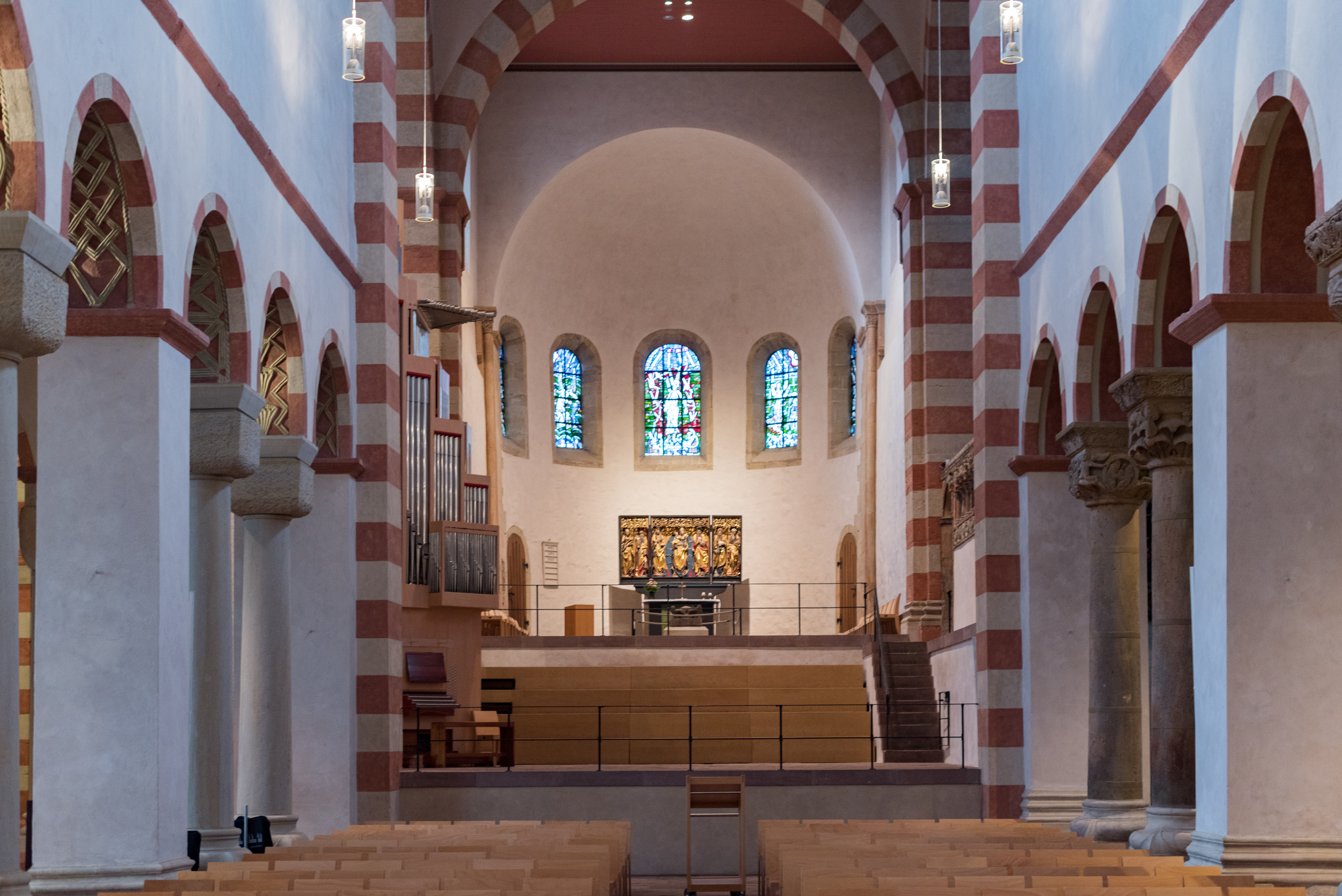 Hildesheim, Michaelisplatz, St. Michaelis, Innenraum